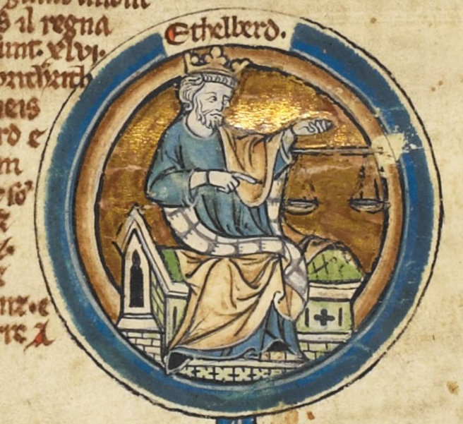 Miniature d'Egbert de Wessex dans une généalogie royale du XIVe siècle.